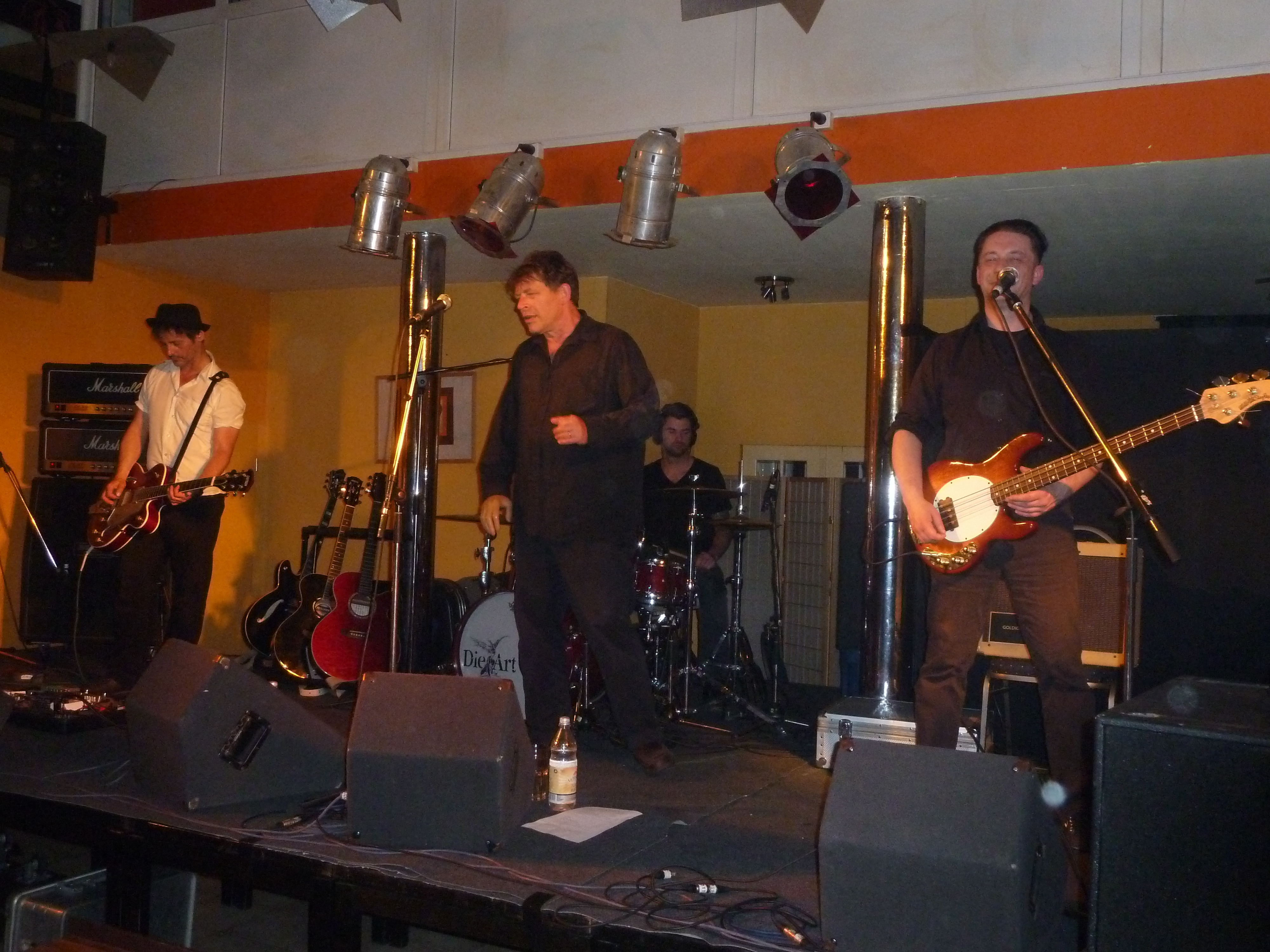 Die Art